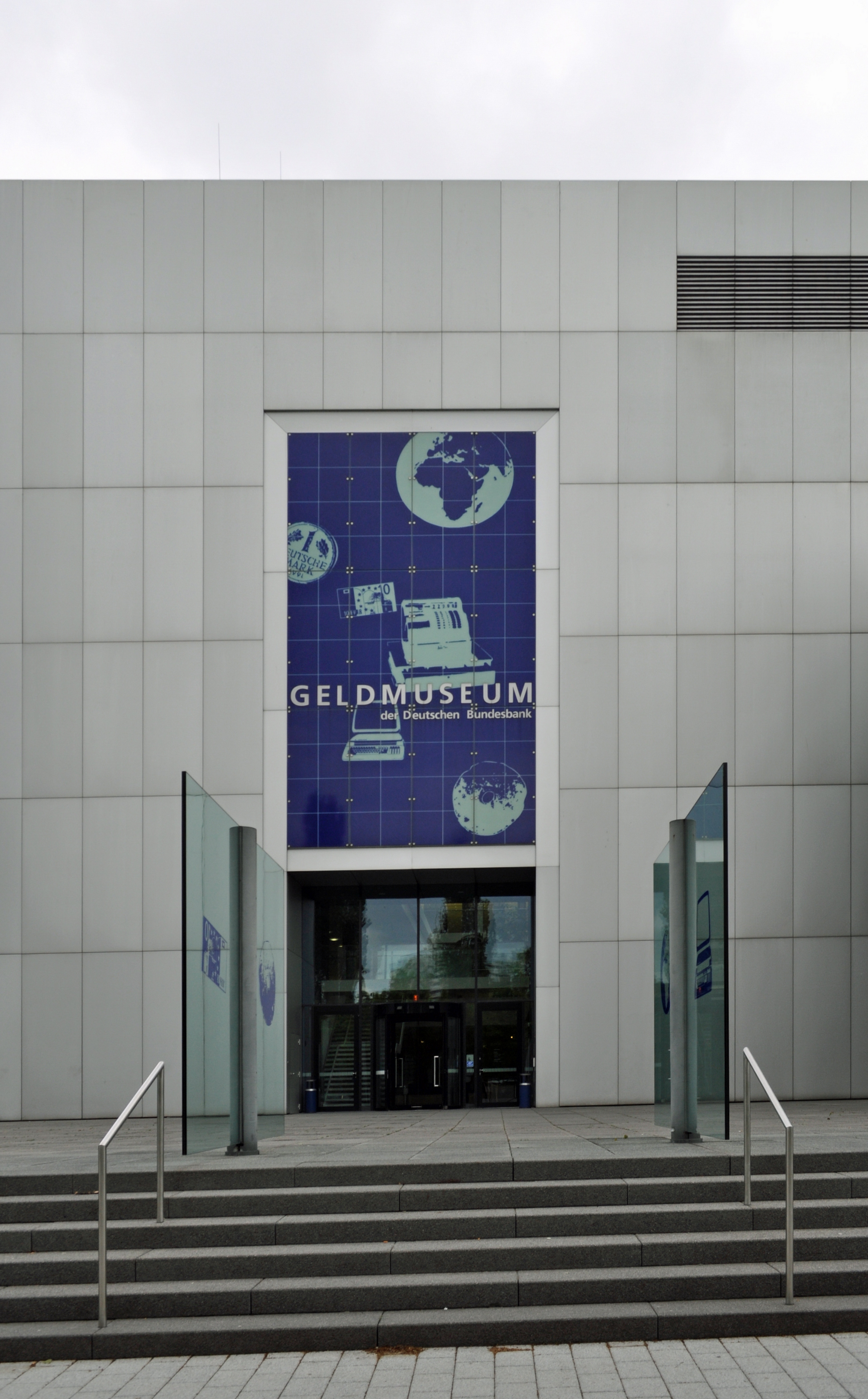 Eingang des Geldmuseums der Deutschen Bundesbank in Frankfurt am Main